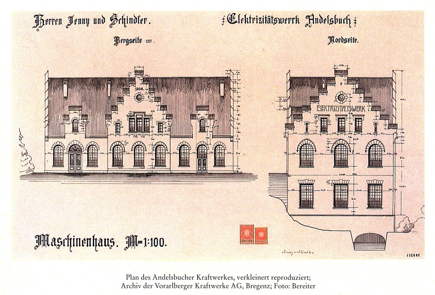 Plan von 1906 des Andelsbucher Kraftwerkes, verkleinert und reproduziert. Idee: Ingenieur Leopold Rhomberg, Dornbirn. Bauherr: Fa. Jenny & Schindler. Projektierung und Bauleitung: Ingenieurbüro Kürsteiner in St.Gallen (Schweiz). Oberleitung: Gabriel Narutowicz, der 1922 als polnischer Staatspräsident ermordet wurde.